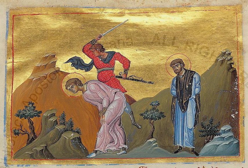 Константинополь. 985 г. Миниатюра Минология Василия II. Ватиканская библиотека. Рим.